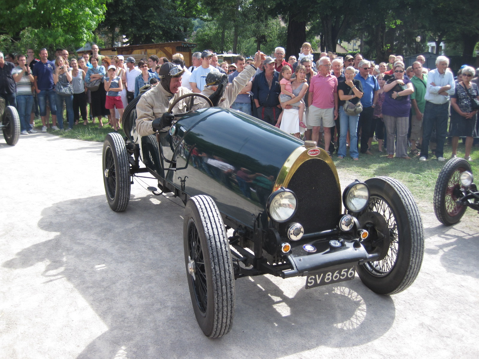 Michel Bugatti ( fils d'Ettore Bugatti ) au Salon Retro Mobile 2011 de Lons-le-Saunier au volant de sa Bugatti Type 30